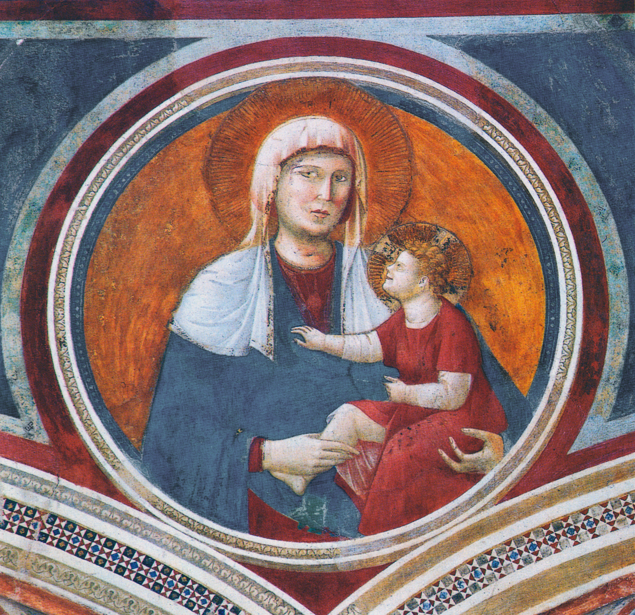 Giotto, madonna col bambino ridente, assisi